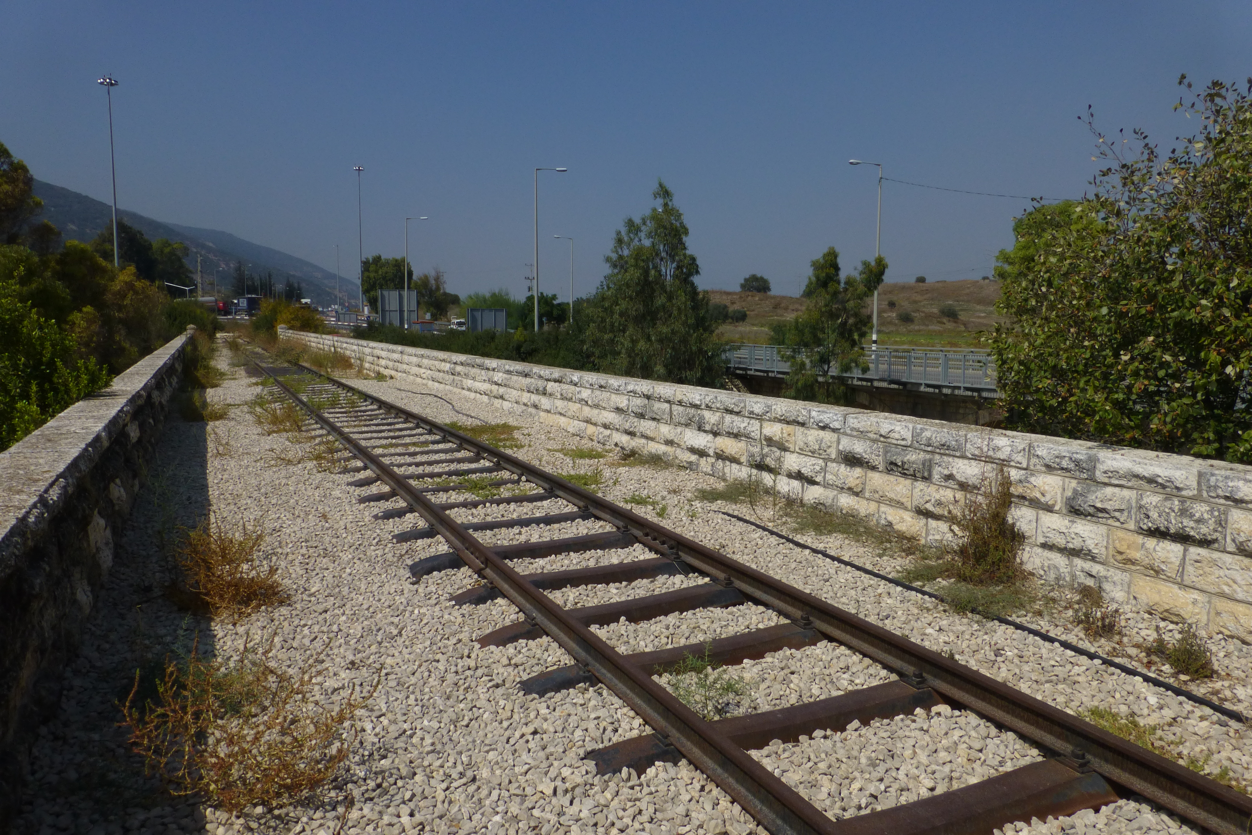 רכבת העמק - מעבירי מים והסוללה - צומת העמקים